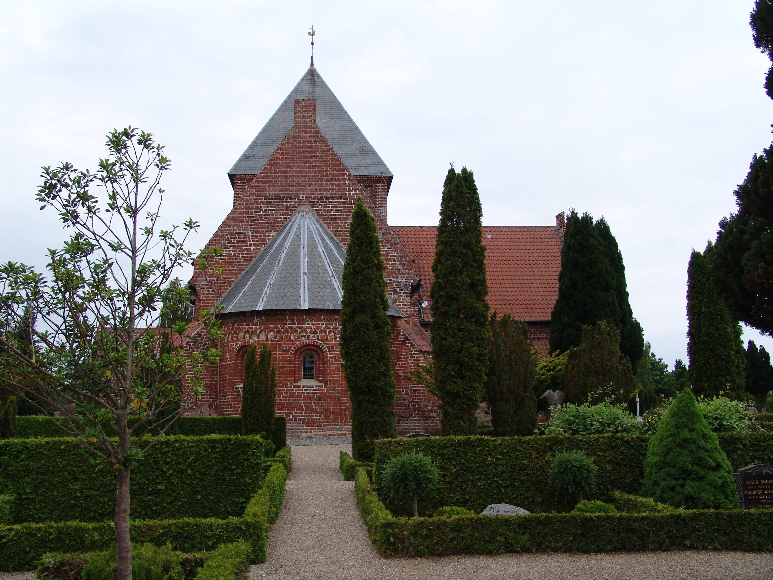 Østofte Kirke